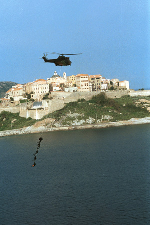 Aérocordage des commandos parachutistes du 2e REP à Calvi